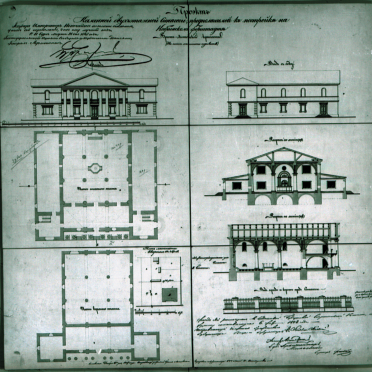 Брест. Проект синагоги. Архитекторы Г.Г. Валлерт, Михаелис. 1846 г. РГИА